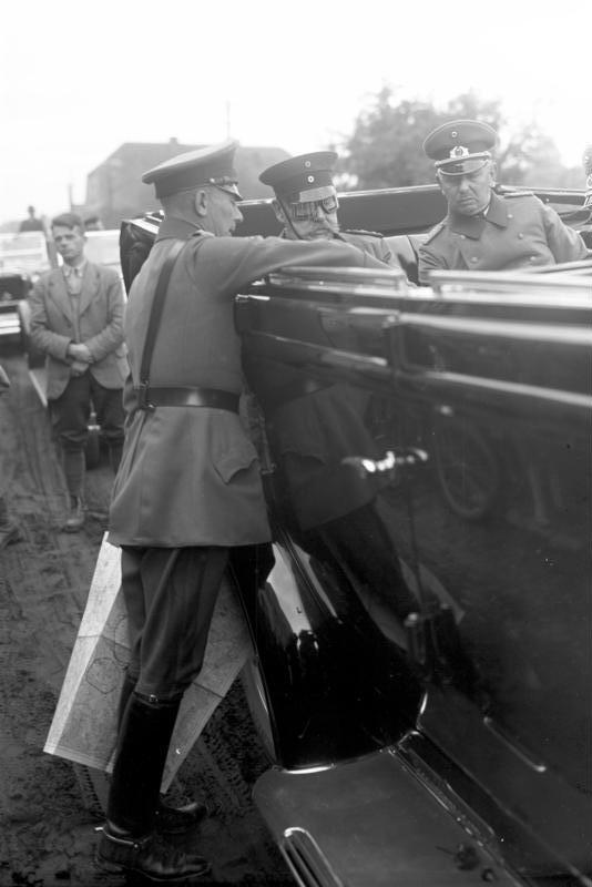 Die grossen Reichswehrmanöver in Frankfurt a/Oder, welche im Beisein des Reichspräsidenten von Hindenburg stattfanden ! Der Reichspräsident von Hindenburg mit Autobrille, lässt sich im Manövergelände Bericht erstatten, neben ihm sein Sohn Oberstleutnant von Hindenburg.